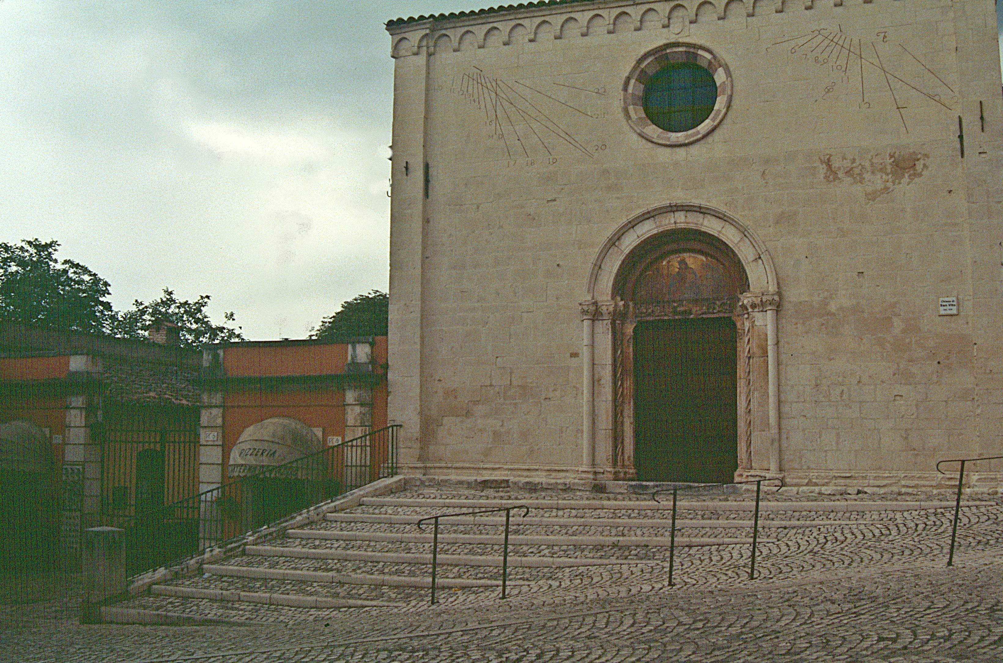 L'Aquila: San Vito